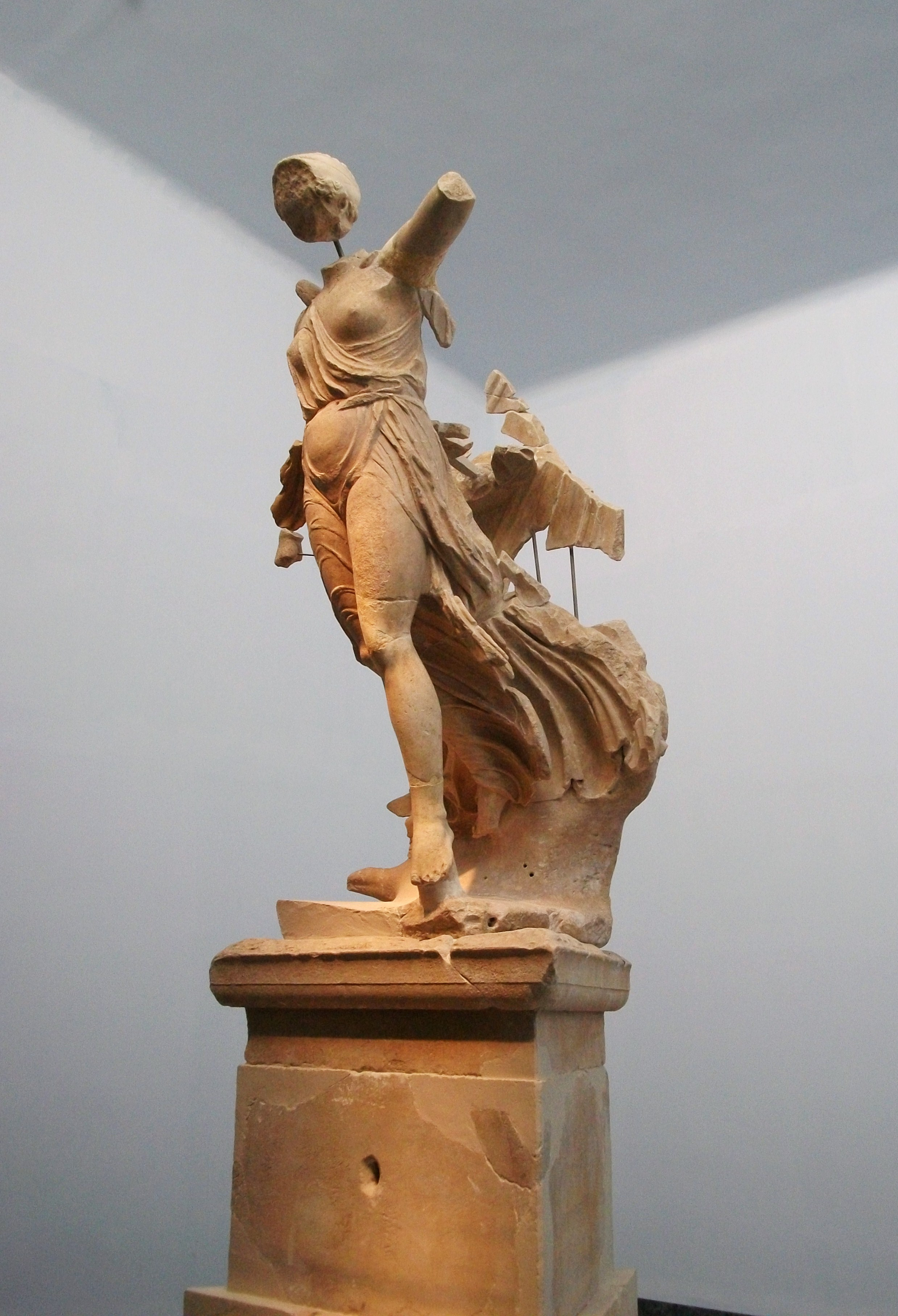 Victòria de Peoni, Museu Arqueològic d'Olímpia.